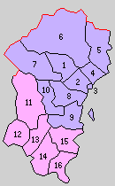 宮崎県南那珂郡の町村制時点の町村。